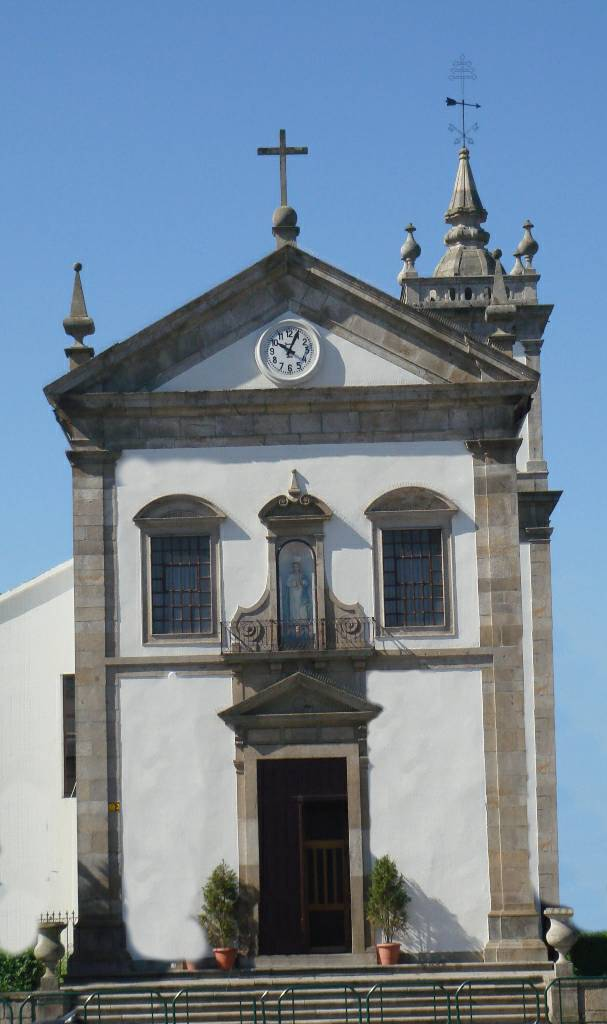 Igreja de Maximinos em Braga. Foto de José Gonçalves